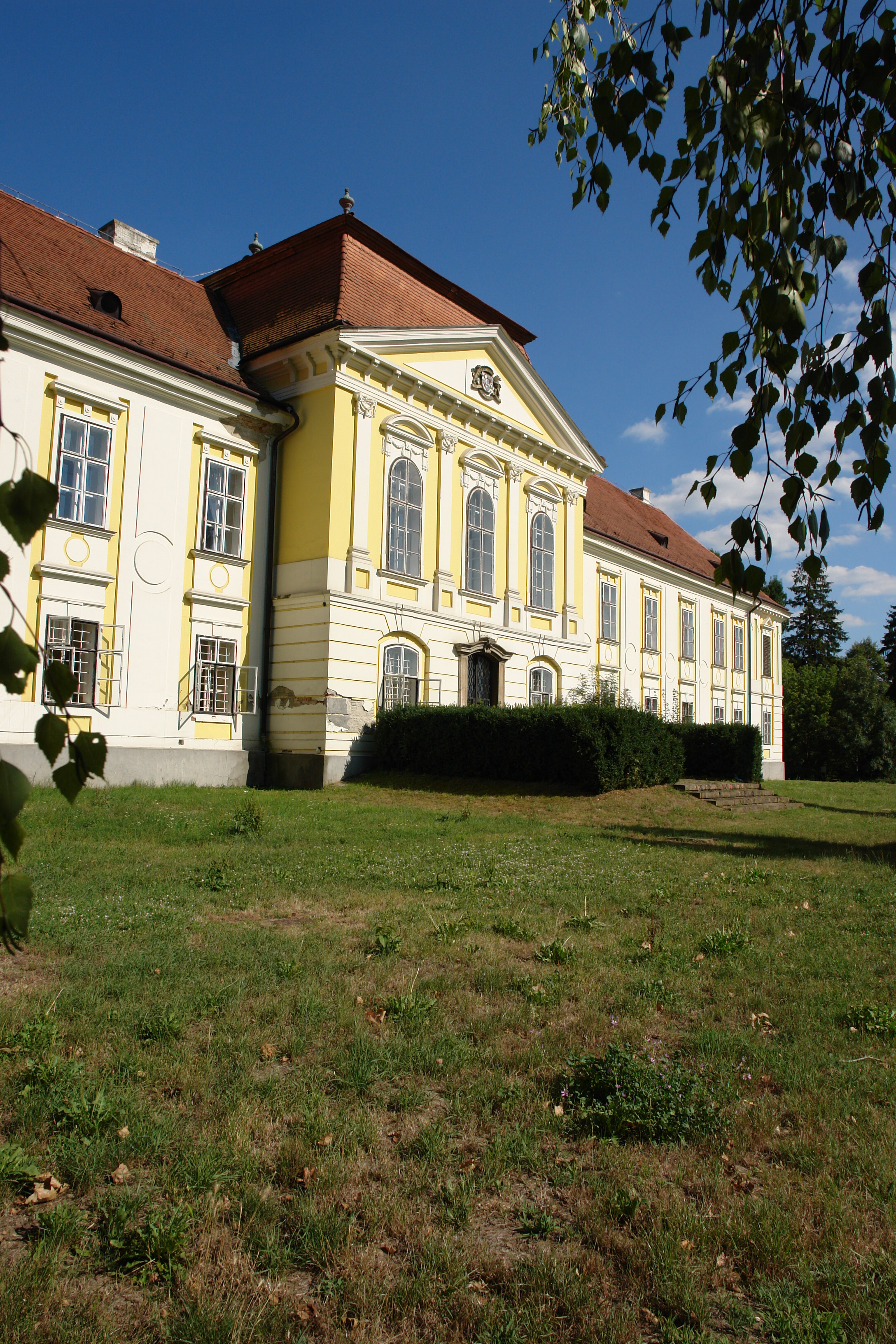 Batthyány-kastély és parkja, Zalaszentgrót This is a photo of a monument in Hungary. Identifier: 11110